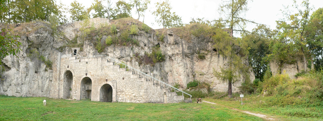 Burg Scharzfels, Oberburg auf Dolomit-Felsen